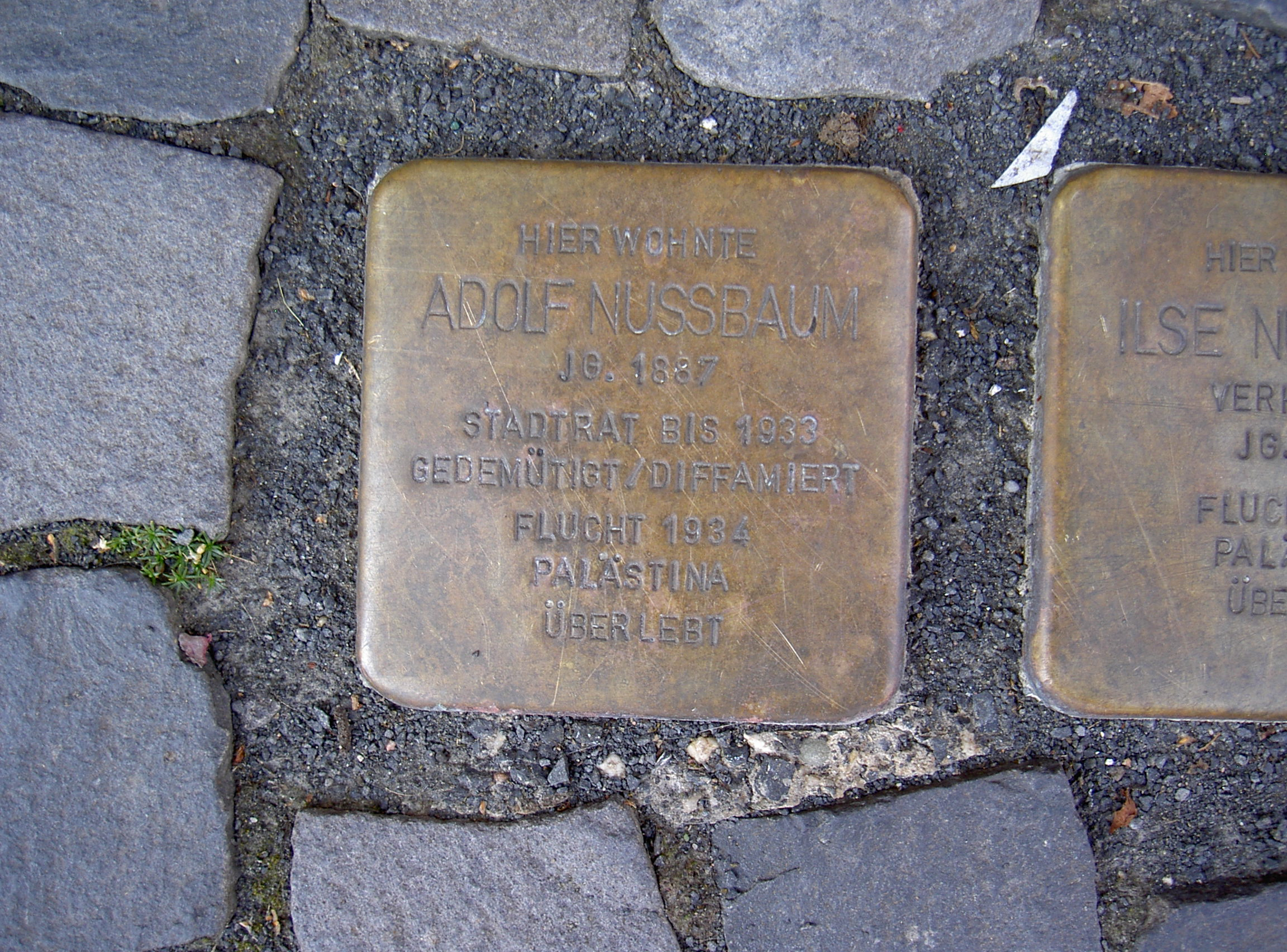 Stolpersteine in Vacha Adolf Nussbaum